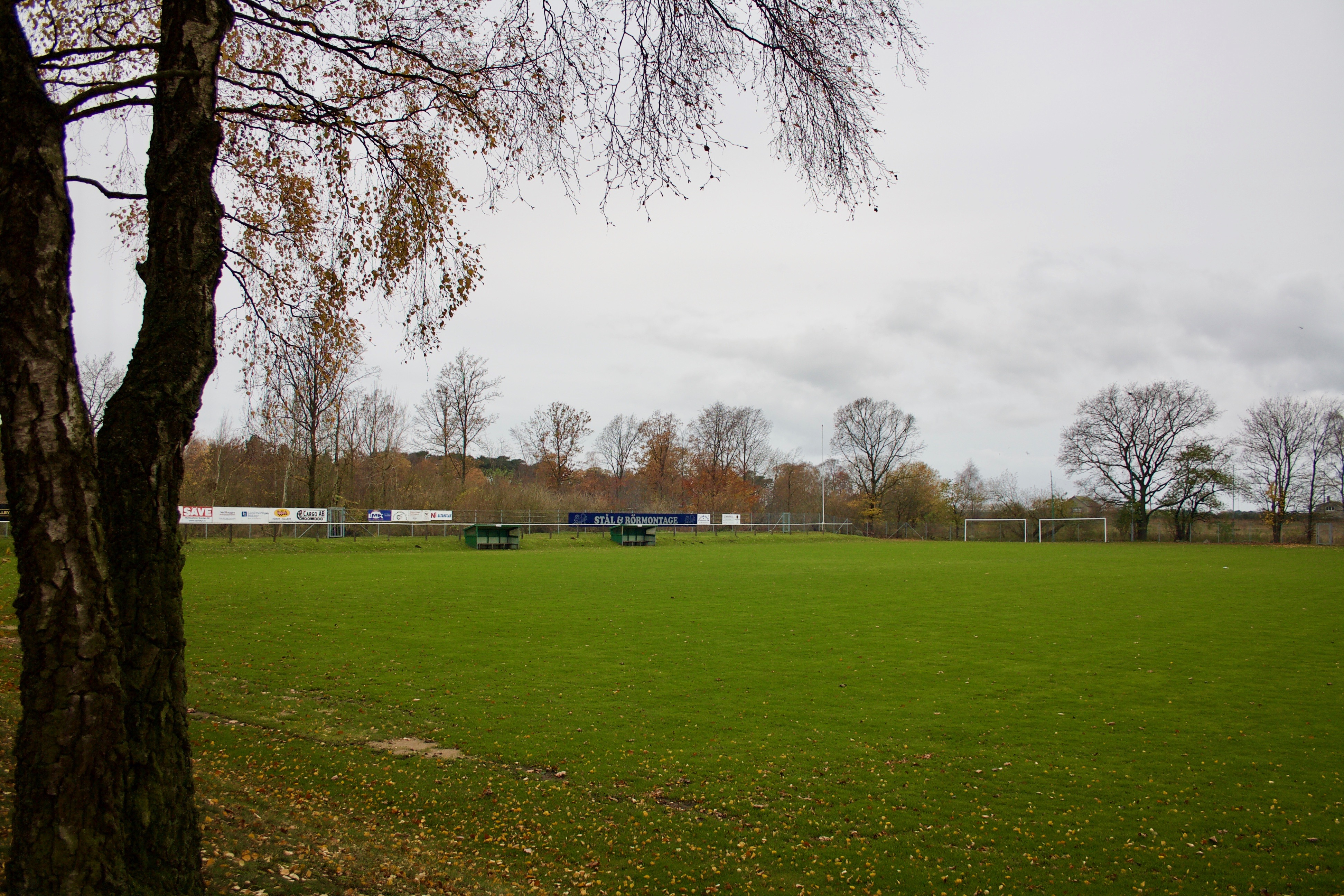 Idrottsplatsen Gröna Vallen i Hörviks fotbollsplan.